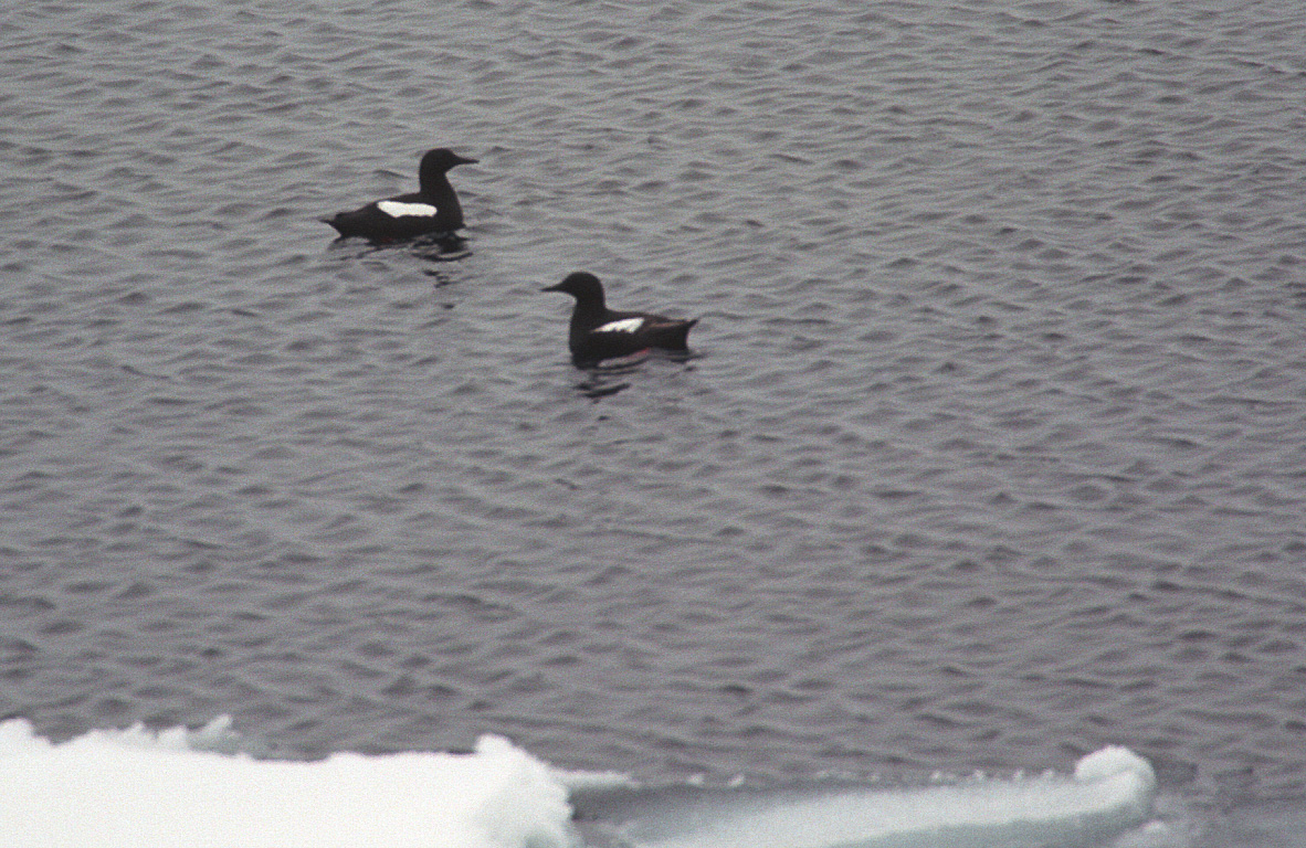 spitsbergen, Black Guillemot